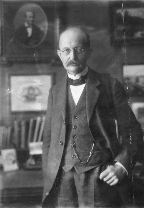 Scherl Bilderdienst: Berliner Nobelpreisträger. Professor Dr. Max Planck erhielt den Nobelpreis 1918 für Chemie ADN-ZB Planck, Max theoretischer Physiker, geb. 23.4.1858 in Kiel, gest. 4.10.1947 in Göttingen, seit 1885 Professor in Kiel, seit 1889 in Berlin, 1930/37 Präsident der Kaiser-Wilhelm-Gesellschaft zur Förderung der Wissenschaften. Er erhielt 1918 den Nobelpreis. 21015-01